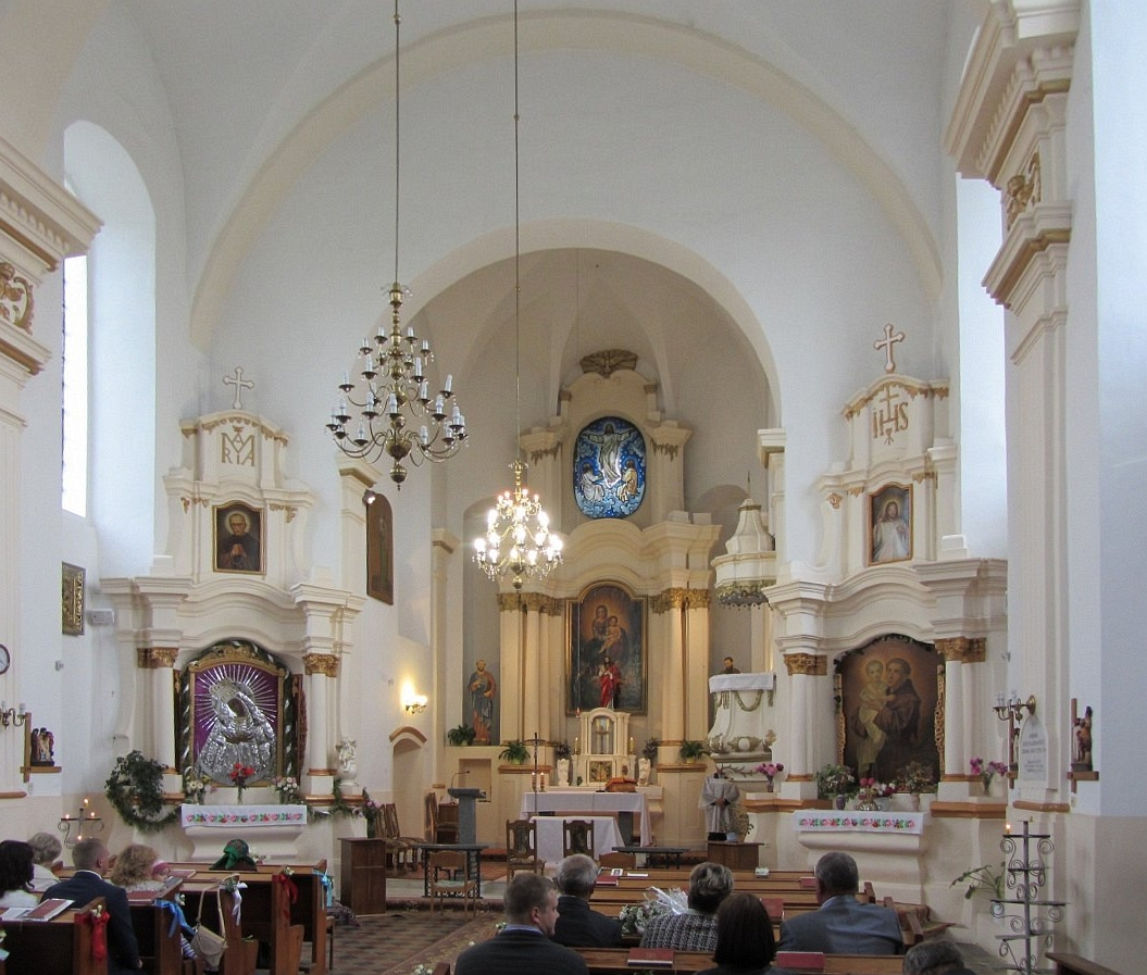 Германавічы. Касцёл